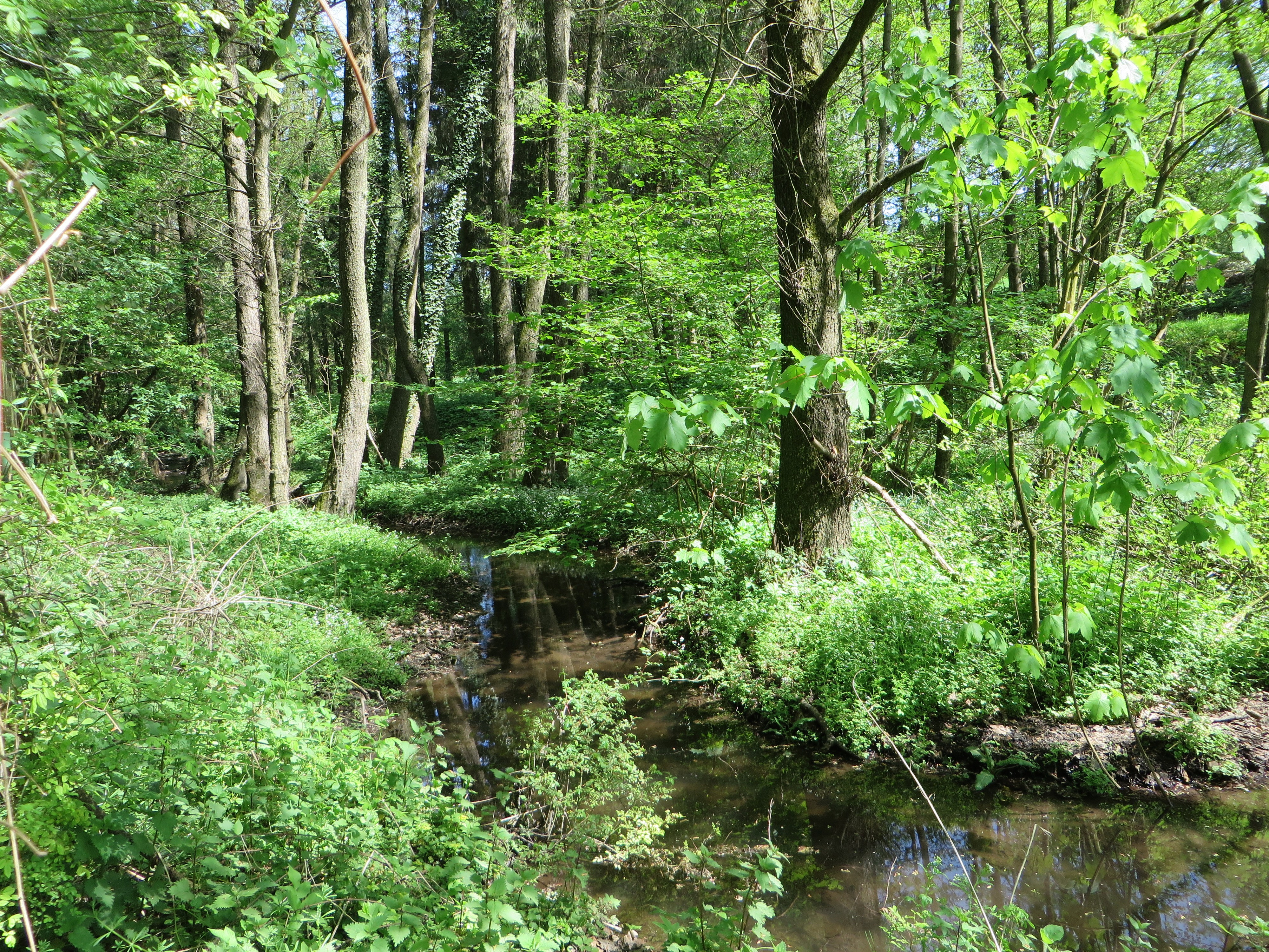 Naturschutzgebiet Henkhauser- und Hasselbachtal (NSG HA-015) in Hagen-Hohenlimburg, Ortsteil Henkhausen. Blick auf den Hasselbach, in den oberhalb des Schutzgebietes der Henkhauser Bach zufließt. Der Hasselbach hat eine Länge von ca. 3,9 km und entspringt am Schälk auf Letmather Gebiet, fließt zwischen Reher Wand und Bemberg (254 m) durch Henkhausen und mündet an der Spannstiftstraße in die Lenne. Das Schutzgebiet umfaßt ein mehrfach verzweigtes Bachsystem und Zuflüsse des Henkhauser- und Hasselbachs östlich von Henkhausen. Die z.T. kerbförmig eingeschnittenen Talbereiche sind überwiegend mit Laubholzarten, u.a. auch mit Erlen und Eschen bestanden. Östlich des Zusammenflusses der beiden Bachsysteme stockt ein großer Eichenwald mit Buchenbeimischung. Im nördlichen Teil des Gebietes finden sich mehrere Hangwiesen bzw. Wiesenbrachen mit Trockenrasenvegetation. In einigen Bereichen sind Feuchtwiesenbrachen vorhanden. Mehrere, z.T. verbuschte Steinbrüche sind über das gesamte Schutzgebiet verteilt.